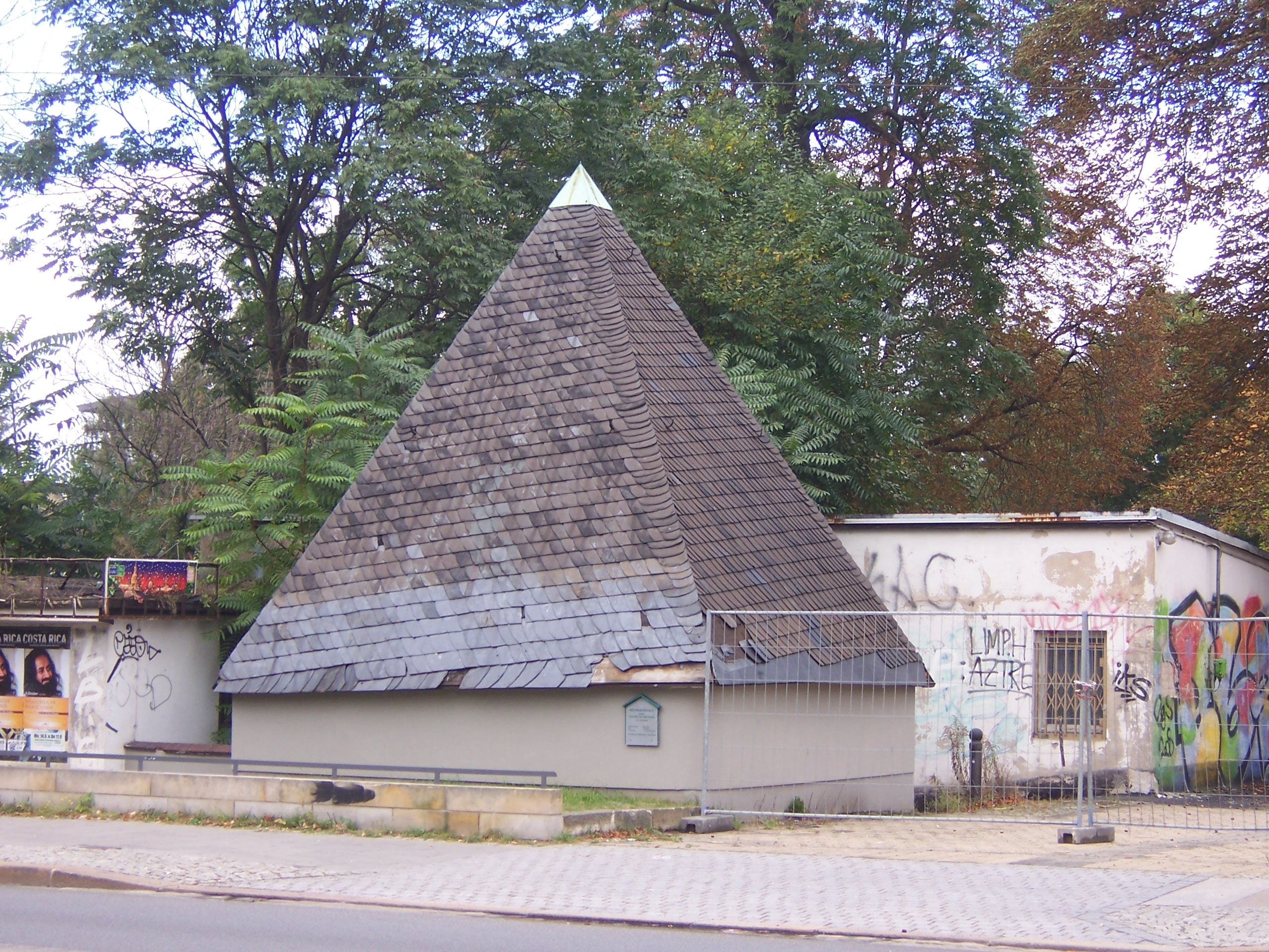 Brunnenhaus am Albertplatz in Dresden